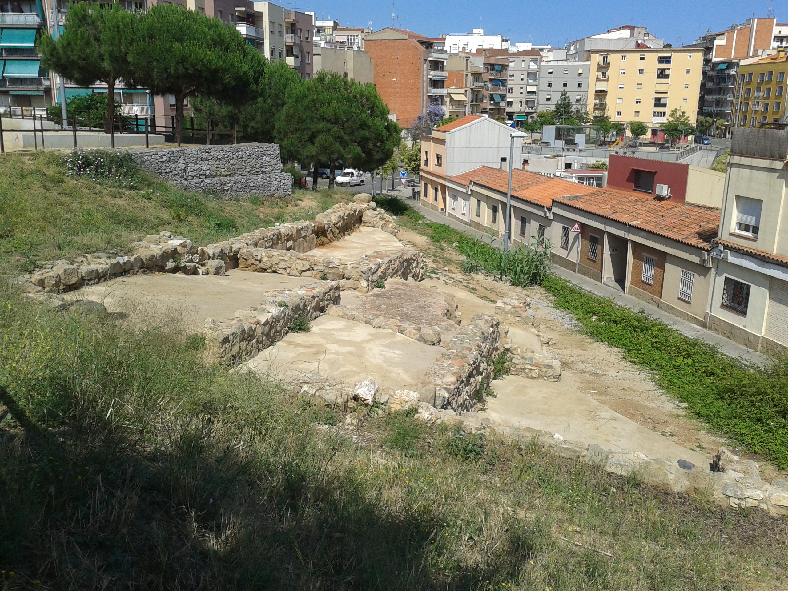 Vil.la romana dels Caputxins